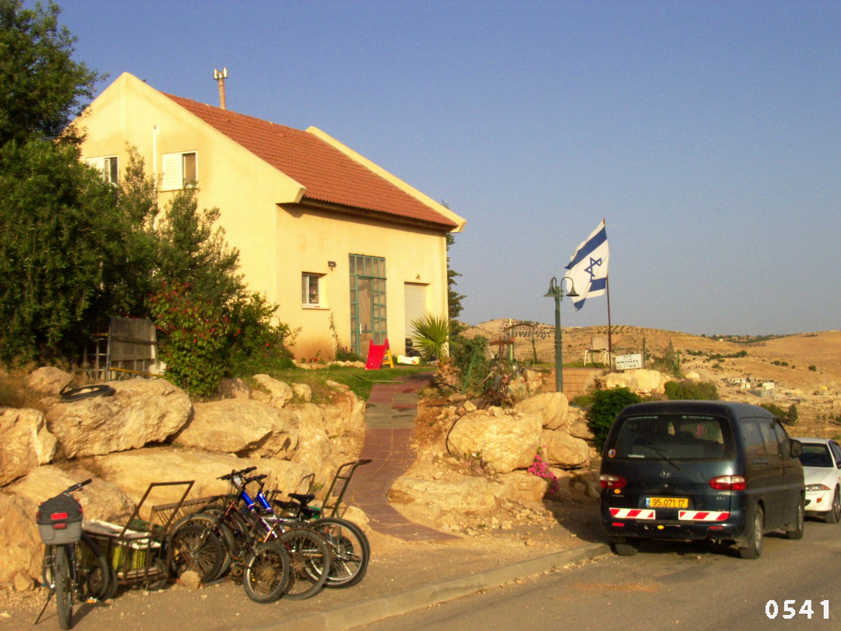 home a maon